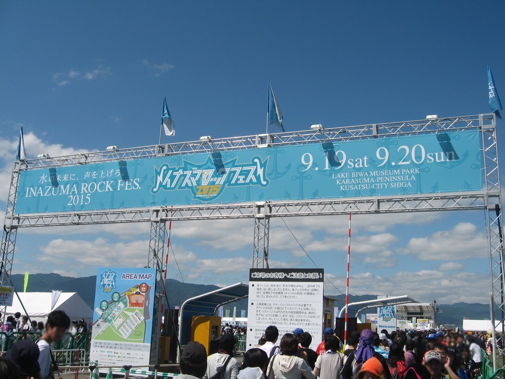 イナズマロックフェス入口風景